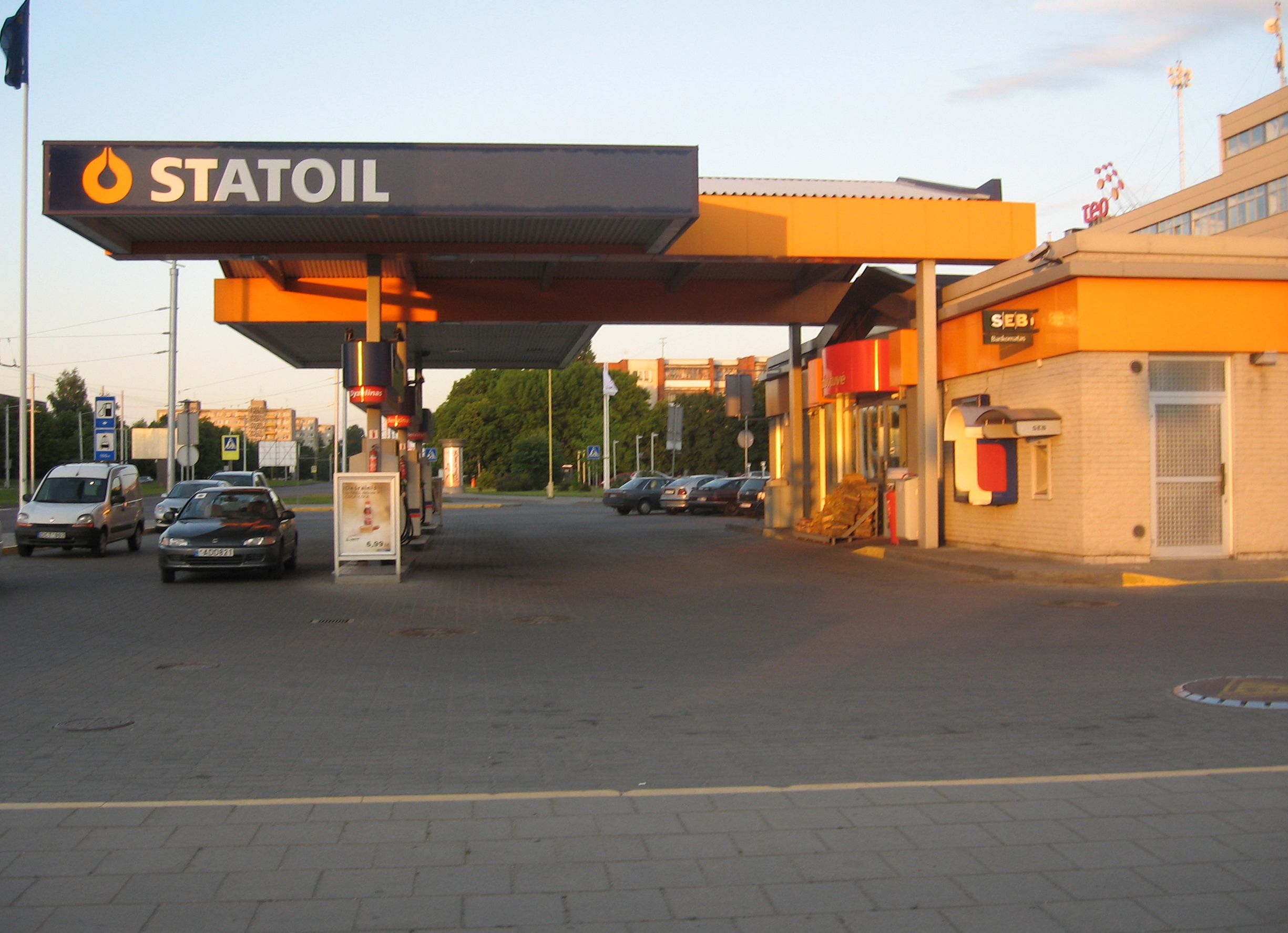 Statoil degalinė, Kaunas.